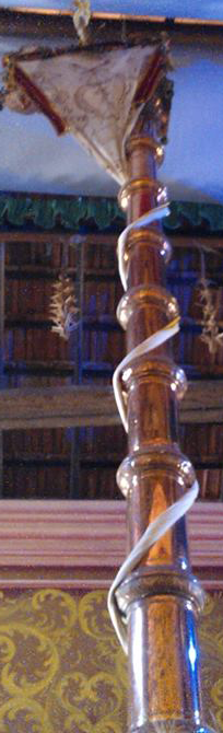 21அடி உயரமான கொடித்தம்பம்